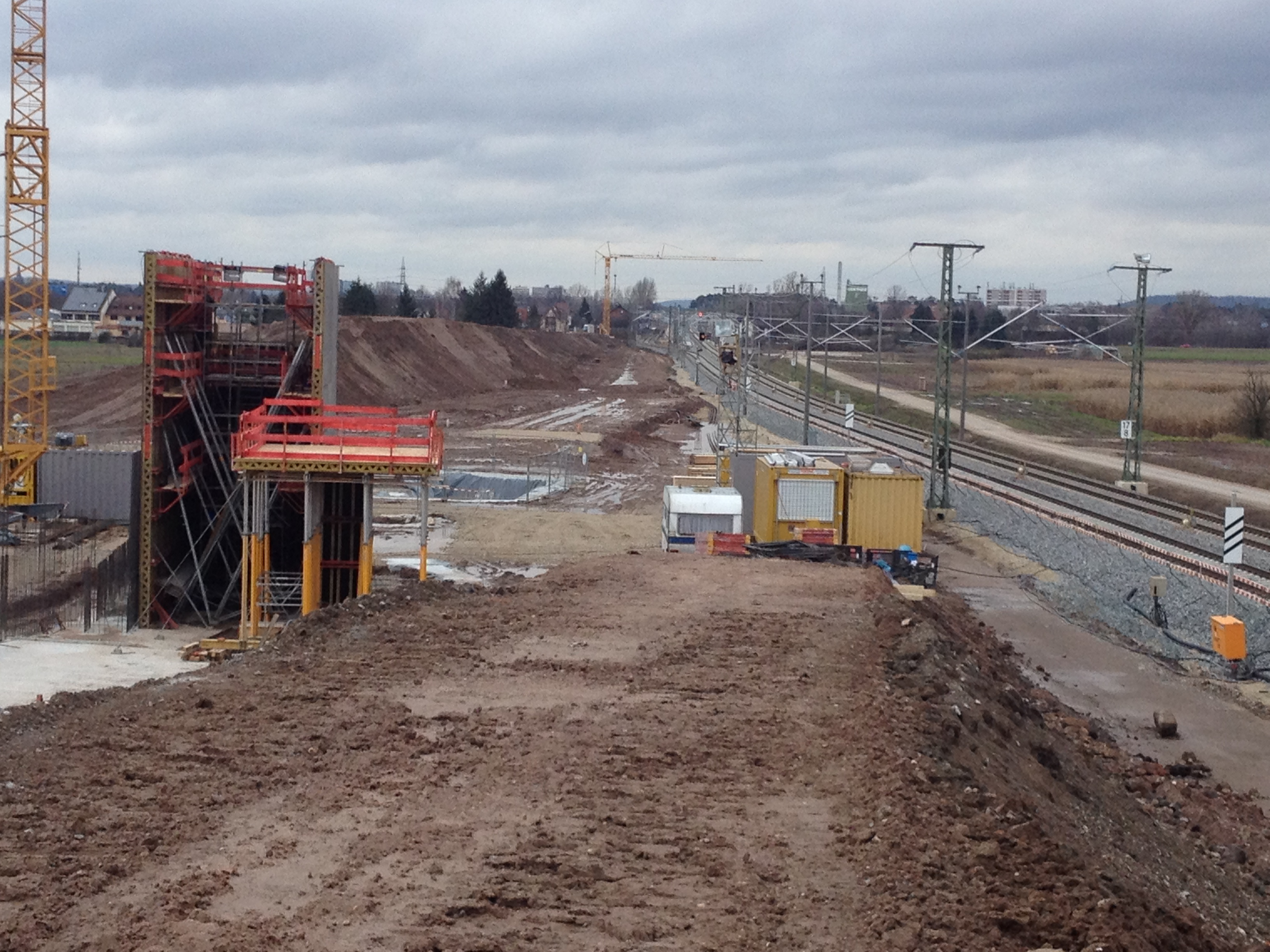 Baustelle Überwerfungsbauwerk Ausfädelung Bahnstrecke Kleinreuth-Eltersdorf Dezember 2014